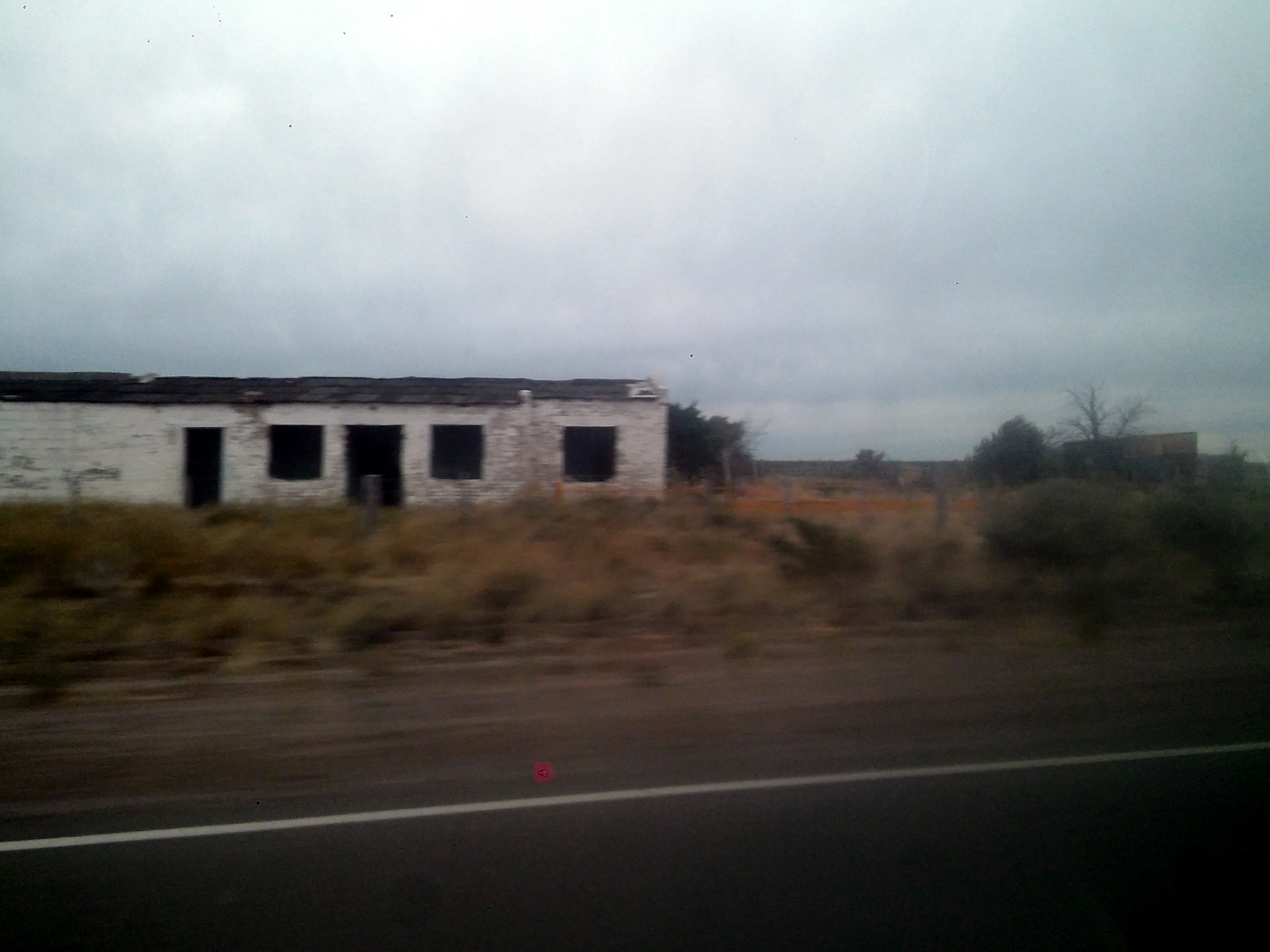 Paraje que se situa donde era la estación